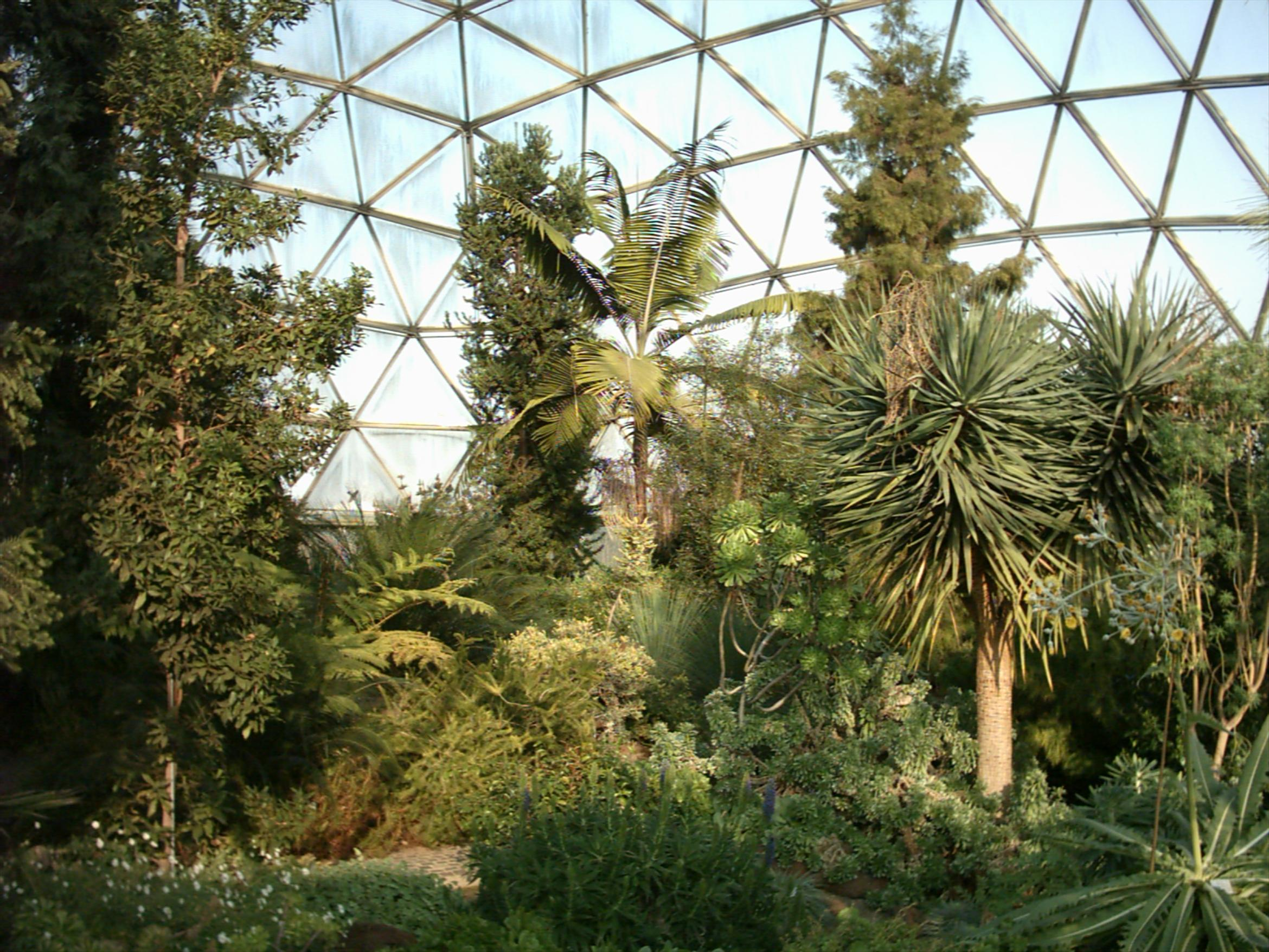 Innenansicht der Kuppel des botanischen Gartens Düsseldorf.